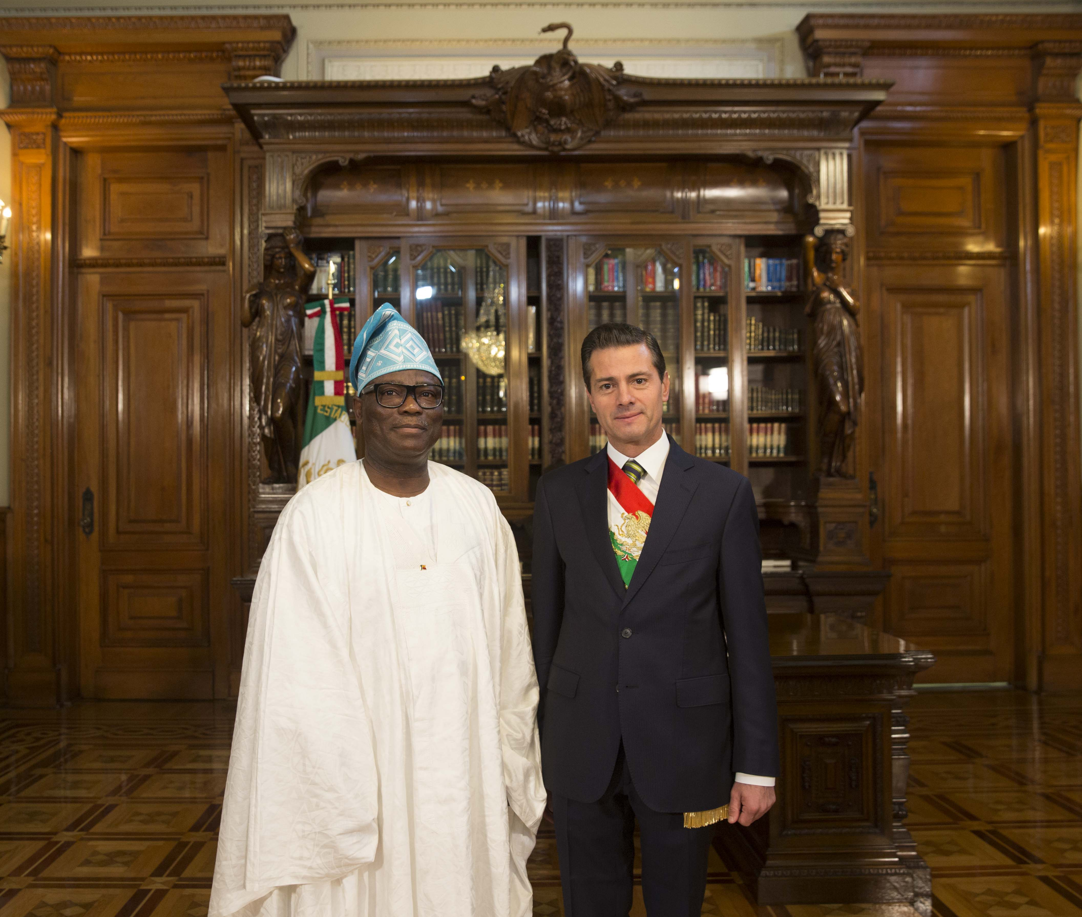 El Presidente Enrique Peña Nieto recibió las cartas credenciales de nuevos Embajadores que iniciaron así sus actividades oficiales como representantes de sus países en México.